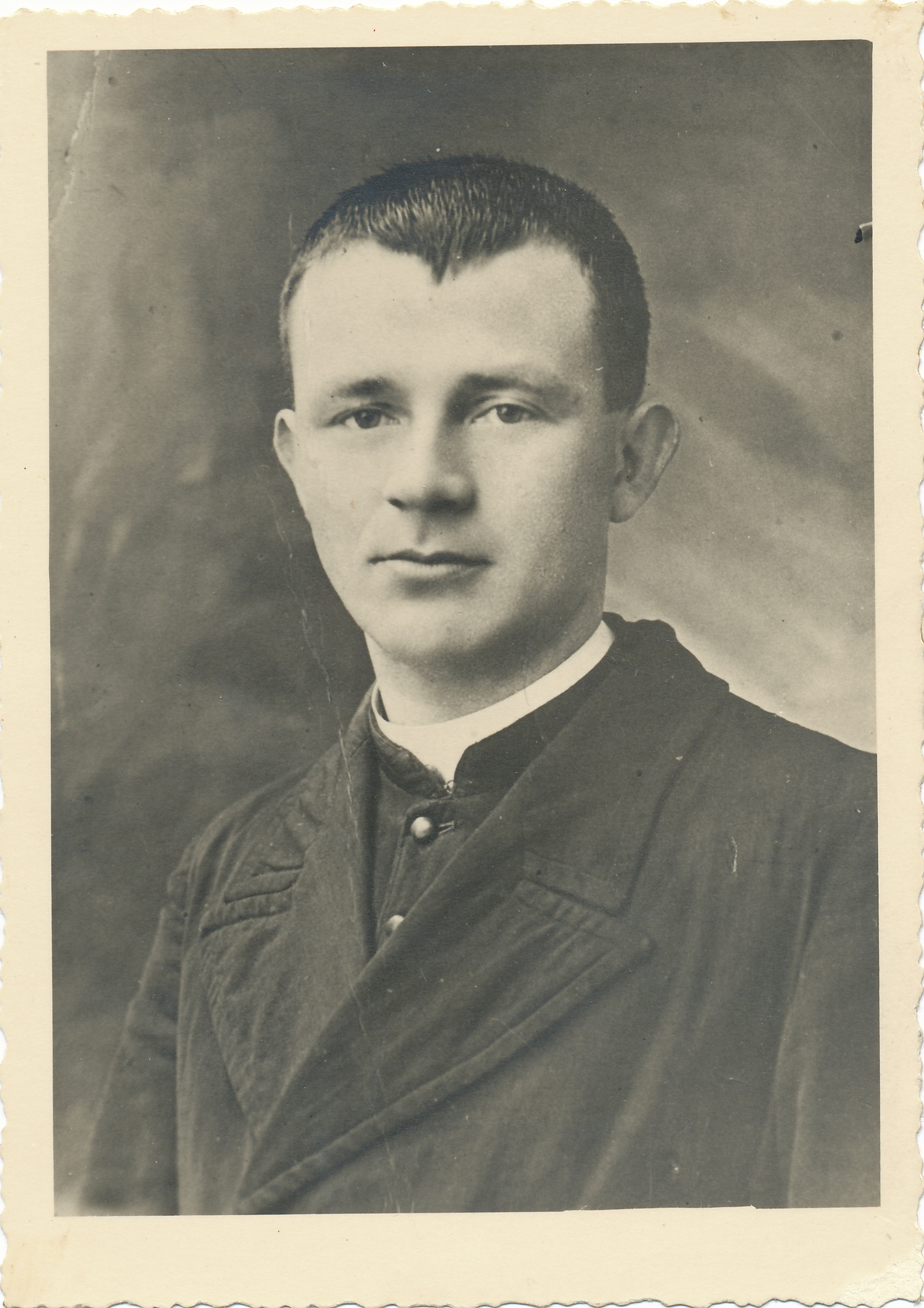 Don Elio Monari